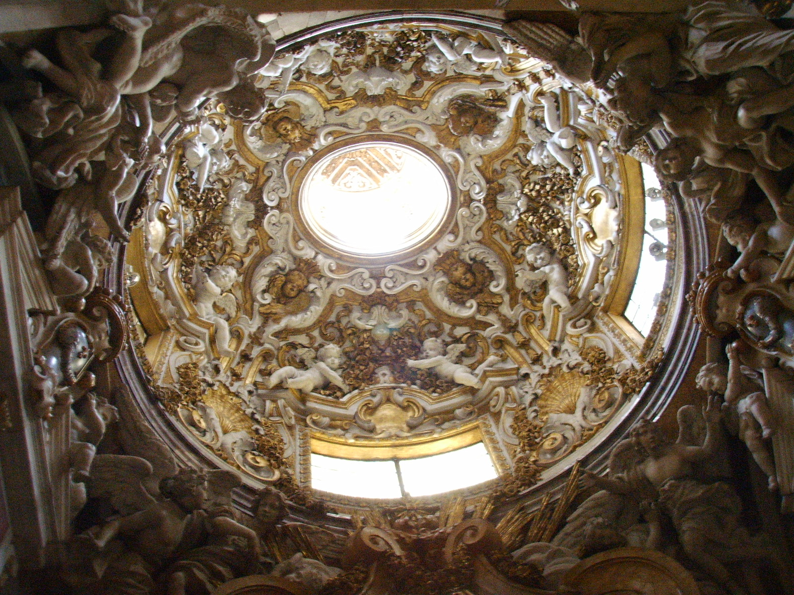 Basilica della santissima annunziata, Cappella di San Giuliano o di San Giuseppe, cupola